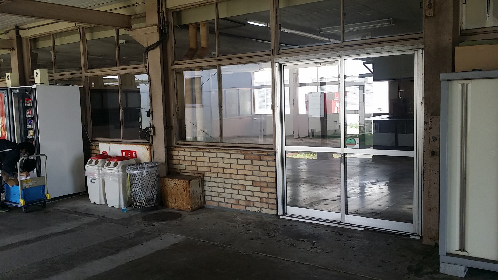 滋賀県運転免許センター 食堂「ライセンス」跡